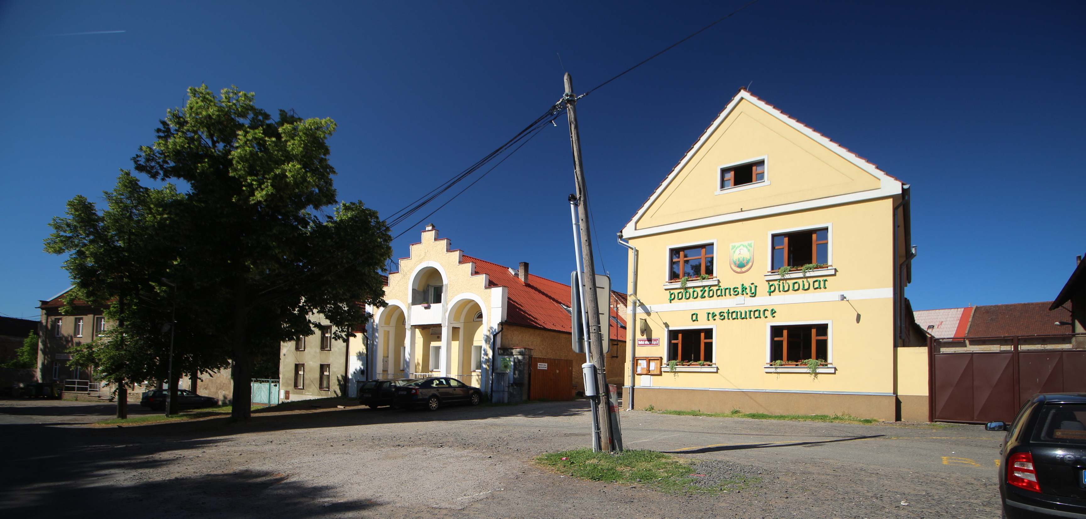 Mutějovice